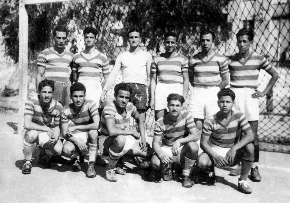 Équipe vainqueur du 1er championnat de Tunisie